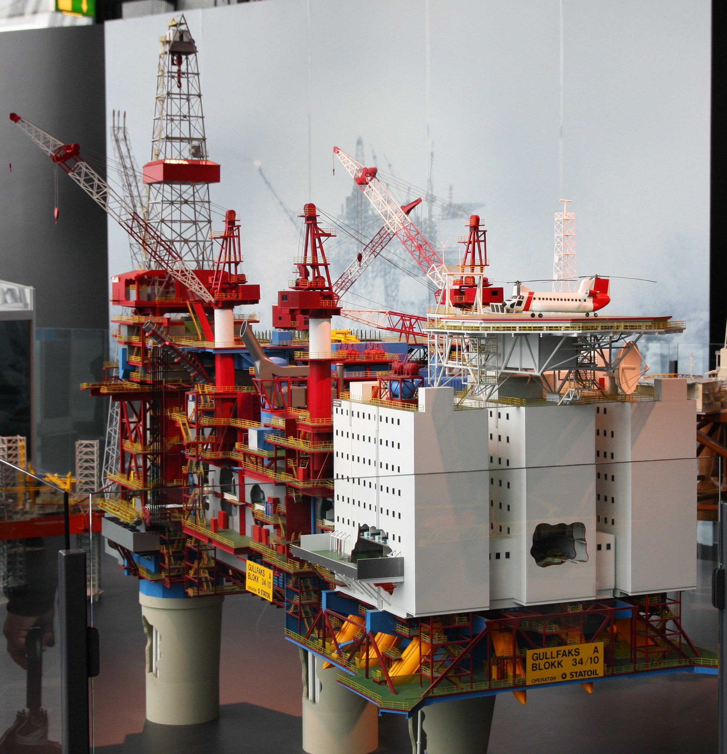 Gullfaks A, modell